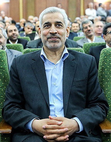 مراسم تودیع صادق خلیلیان(وزیر جهاد کشاورزی) - مرداد ۱۳۹۲